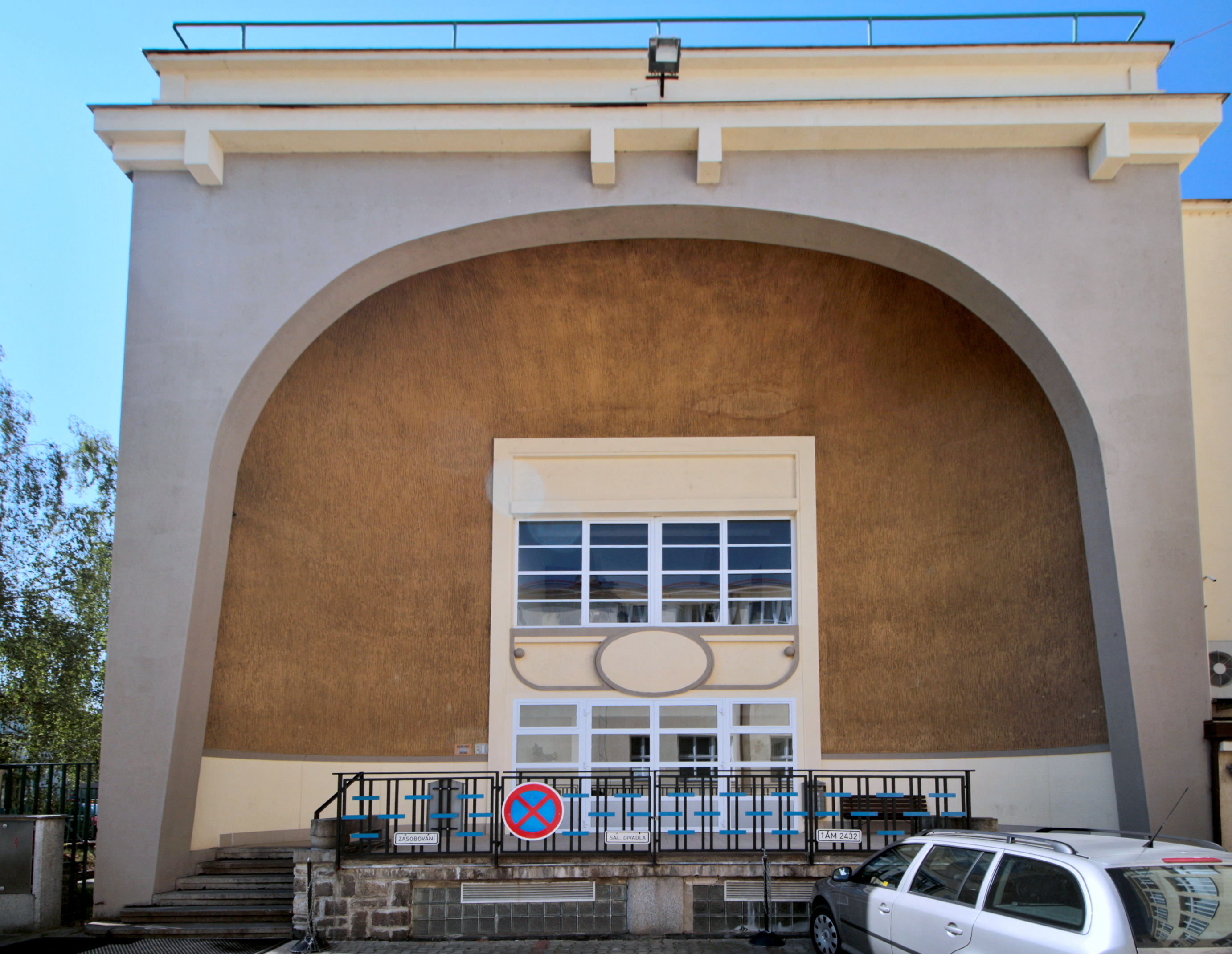 Salesiánské centrum Praha-Kobylisy